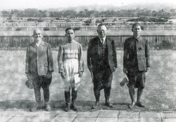 1944年6月18日、能力検定競走